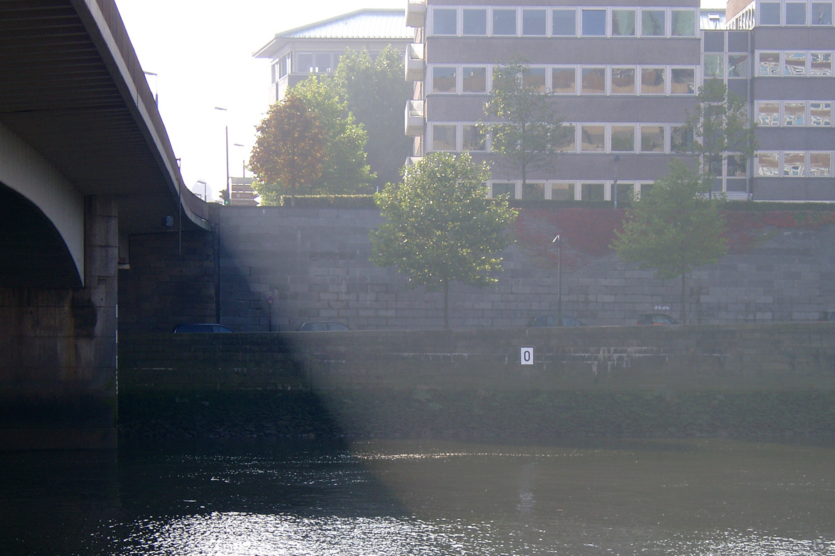 Beginn der Unterweser. Nullpunkt der Unterweserkilometrierung am linken Weserufer neben der Wilhelm-Kaisen-Brücke in der Bremer Innenstadt.